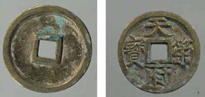 五代十国马殷铸鎏金“天策府宝